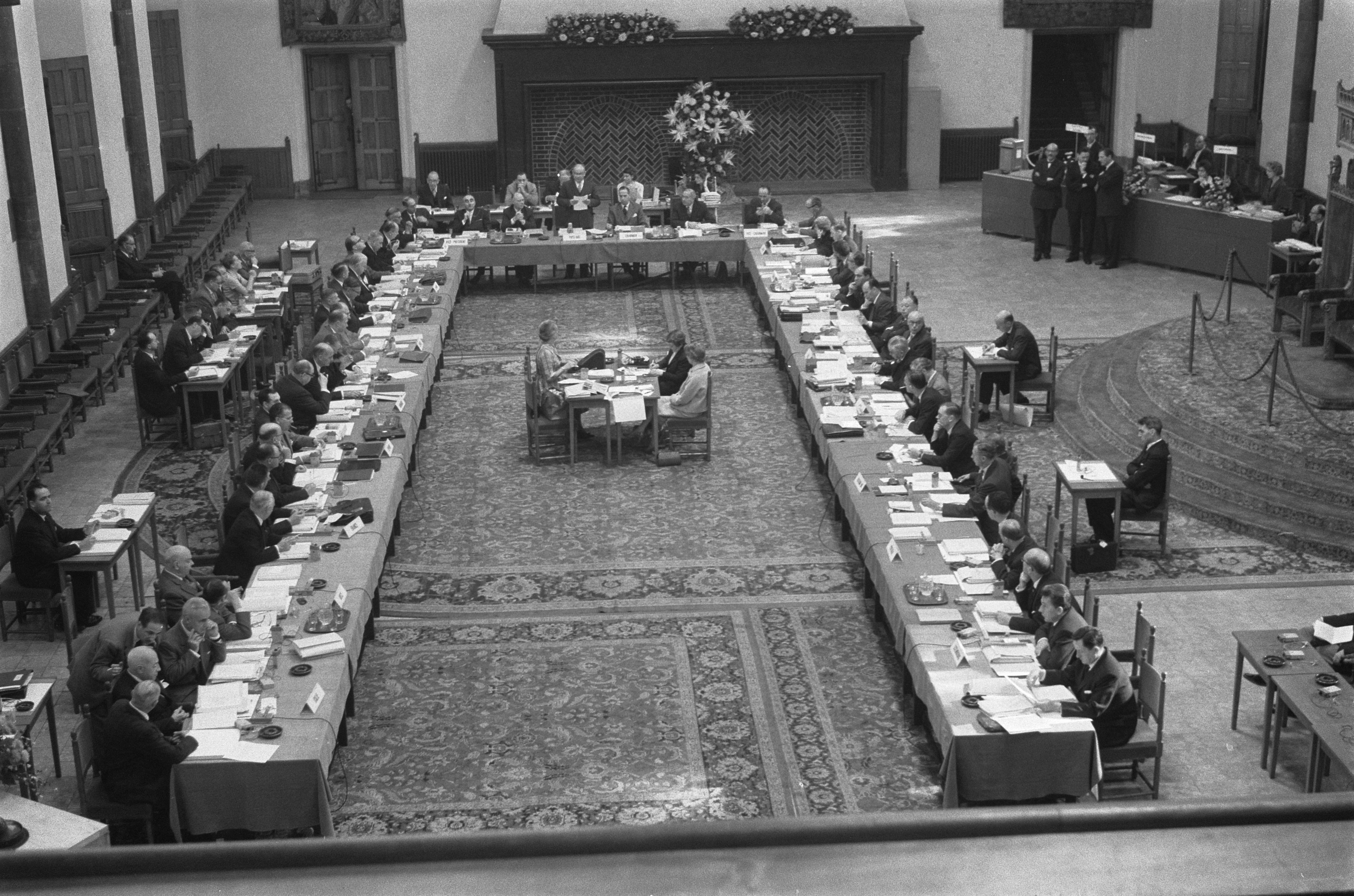 Collectie / Archief : Fotocollectie Anefo Reportage / Serie : [ onbekend ] Beschrijving : Opening conferentie van Ministers van Verkeer in de Ridderzaal in Den Haag , overzicht van de Ridderzaal met de 15 Ministers van verkeer Datum : 5 oktober 1960 Locatie : Den Haag, Zuid-Holland Trefwoorden : Openingen, conferenties, ministers, overzichten Instellingsnaam : Ridderzaal Fotograaf : Pot, Harry / Anefo Auteursrechthebbende : Nationaal Archief Materiaalsoort : Negatief (zwart/wit) Nummer archiefinventaris : bekijk toegang 2.24.01.05 Bestanddeelnummer : 911-6482